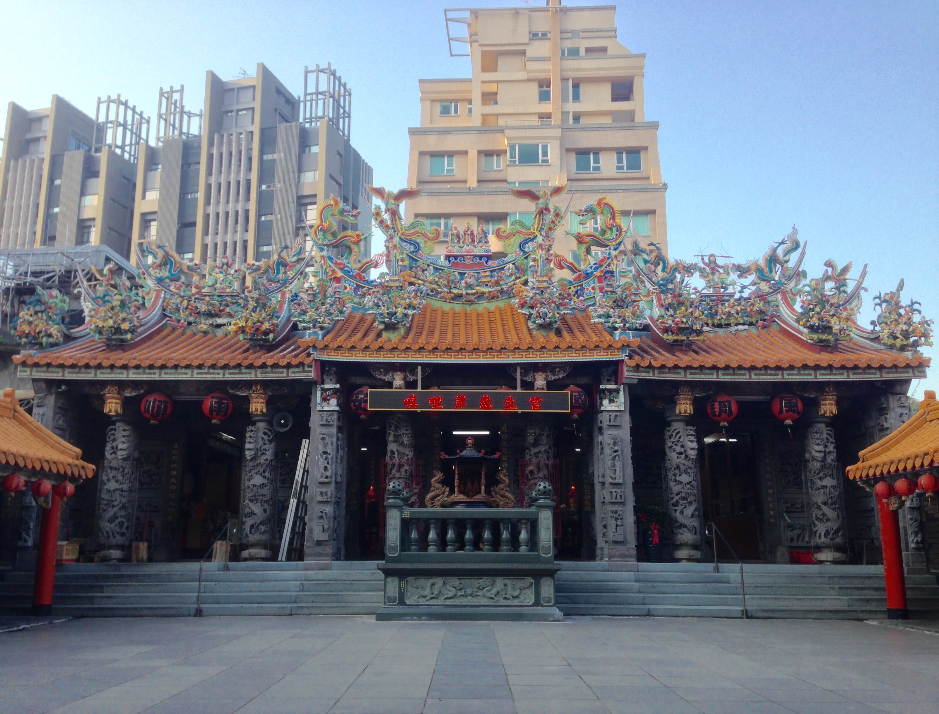 北投唭哩岸慈生宮